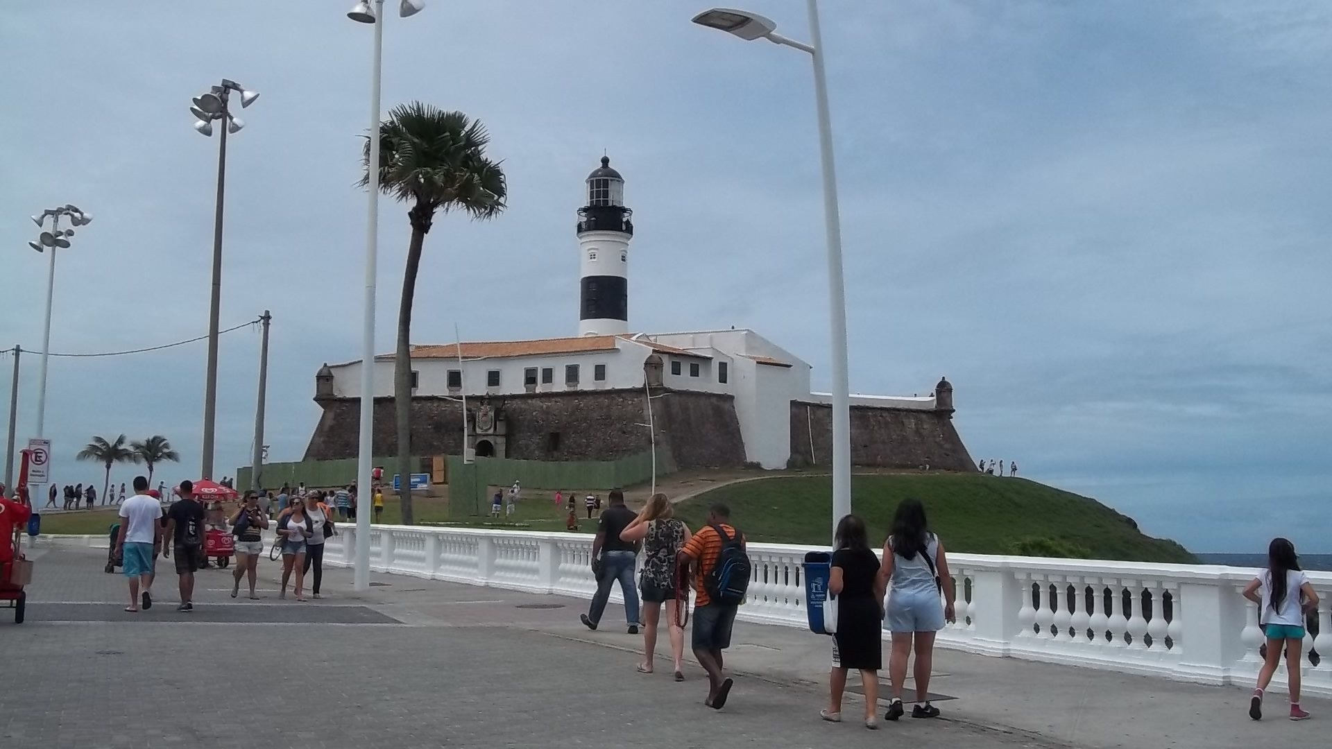 Faro de la Barra, en Salvador de Bahía, primera capital del Brasil.